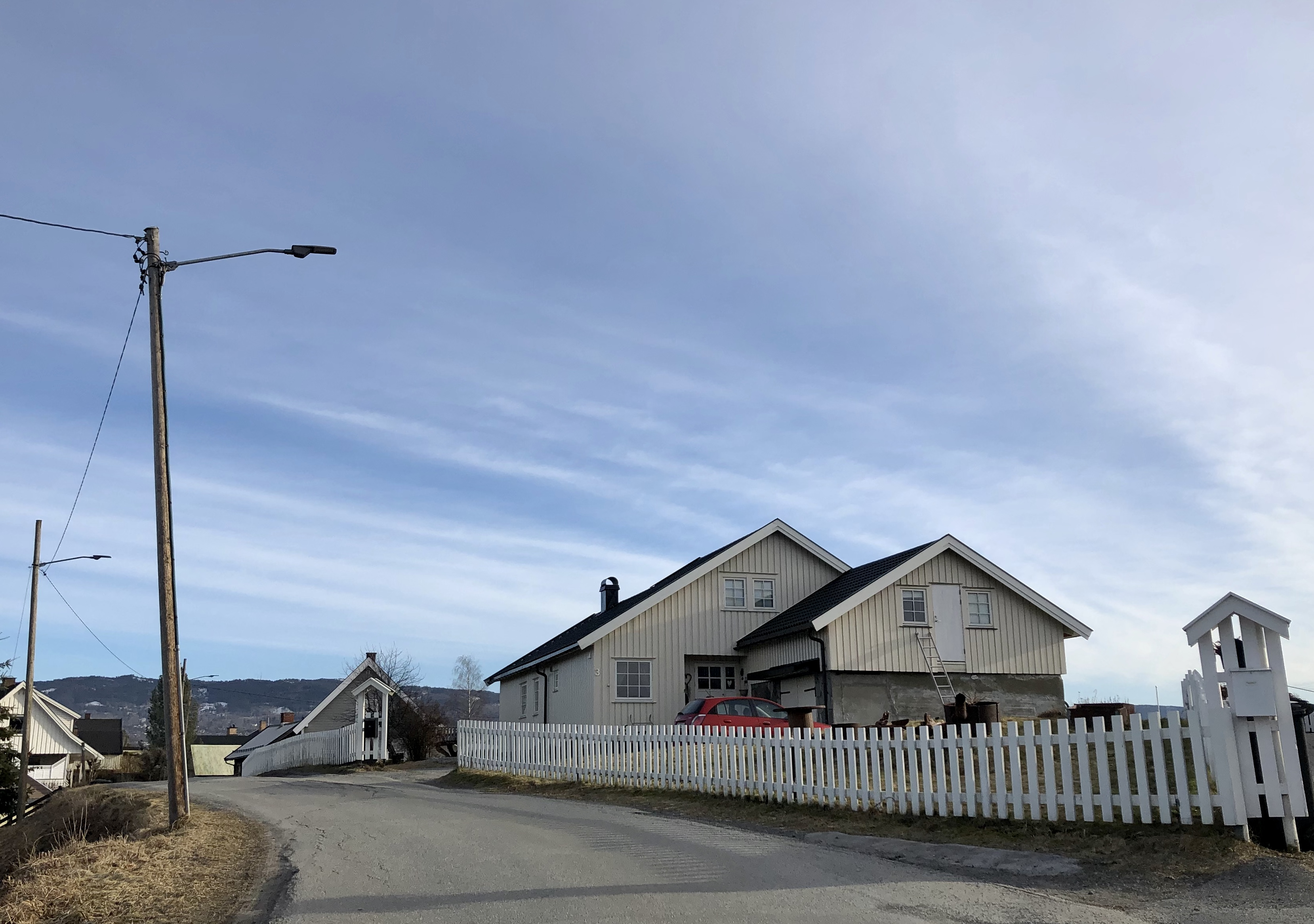 Lageshallveien 3, Hønefoss